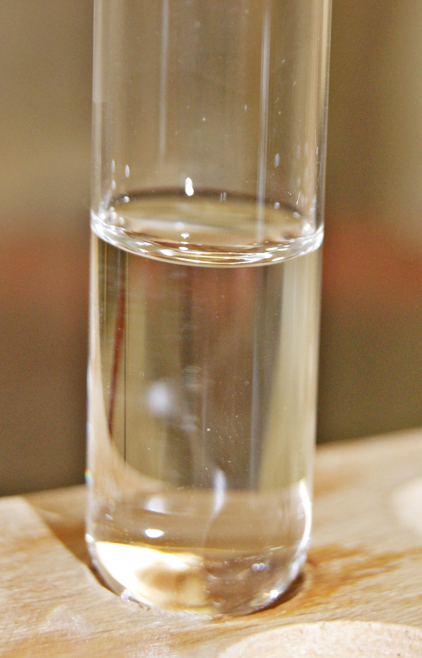 Essigsäureethylester = Ethylacetat